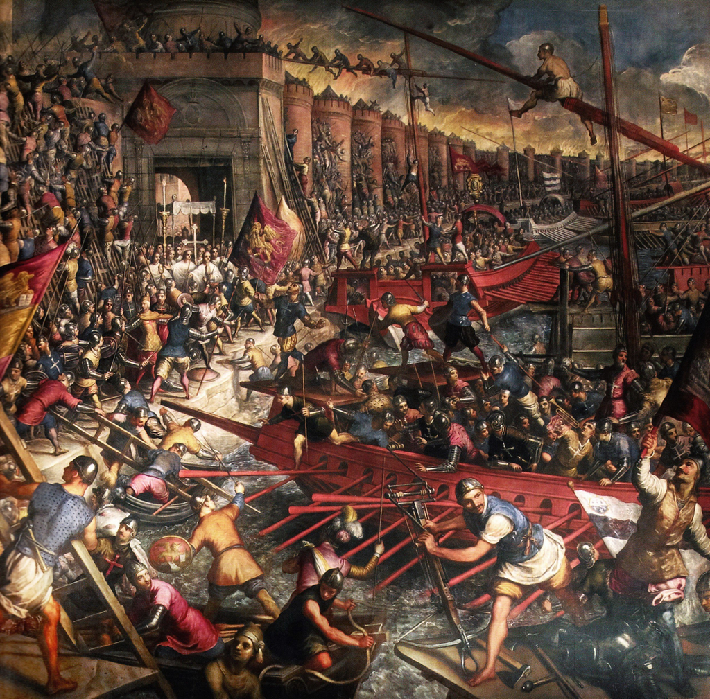 Caduta di Costantinopoli, 1598-1605